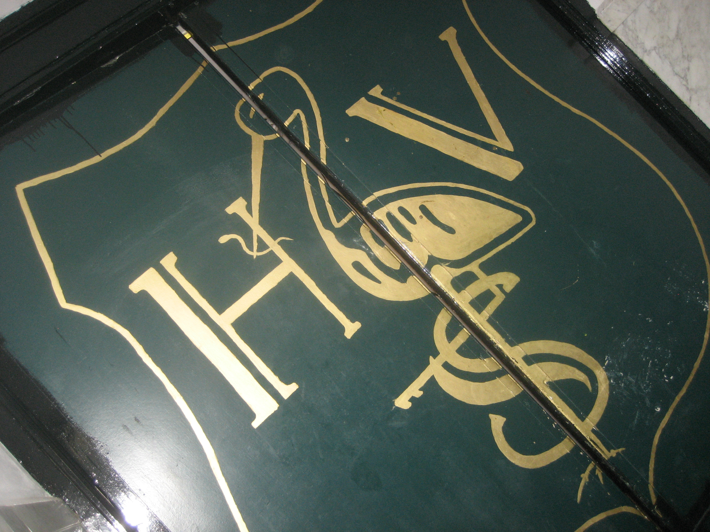 Haagse Studenten Vereeniging. Deur in het pand Burgemeester van Karnebeeklaan 3, Den Haag